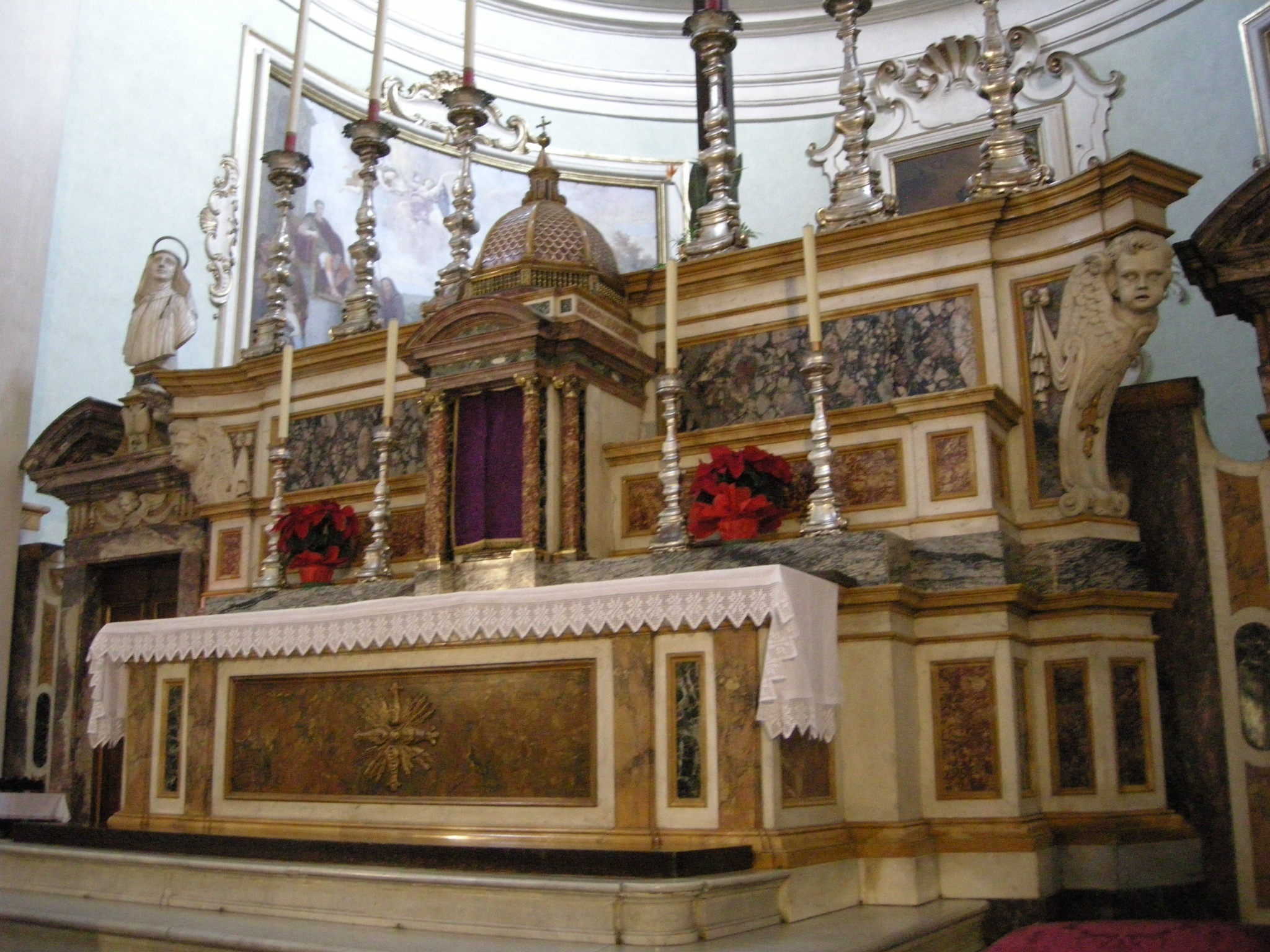 San paolino, altare